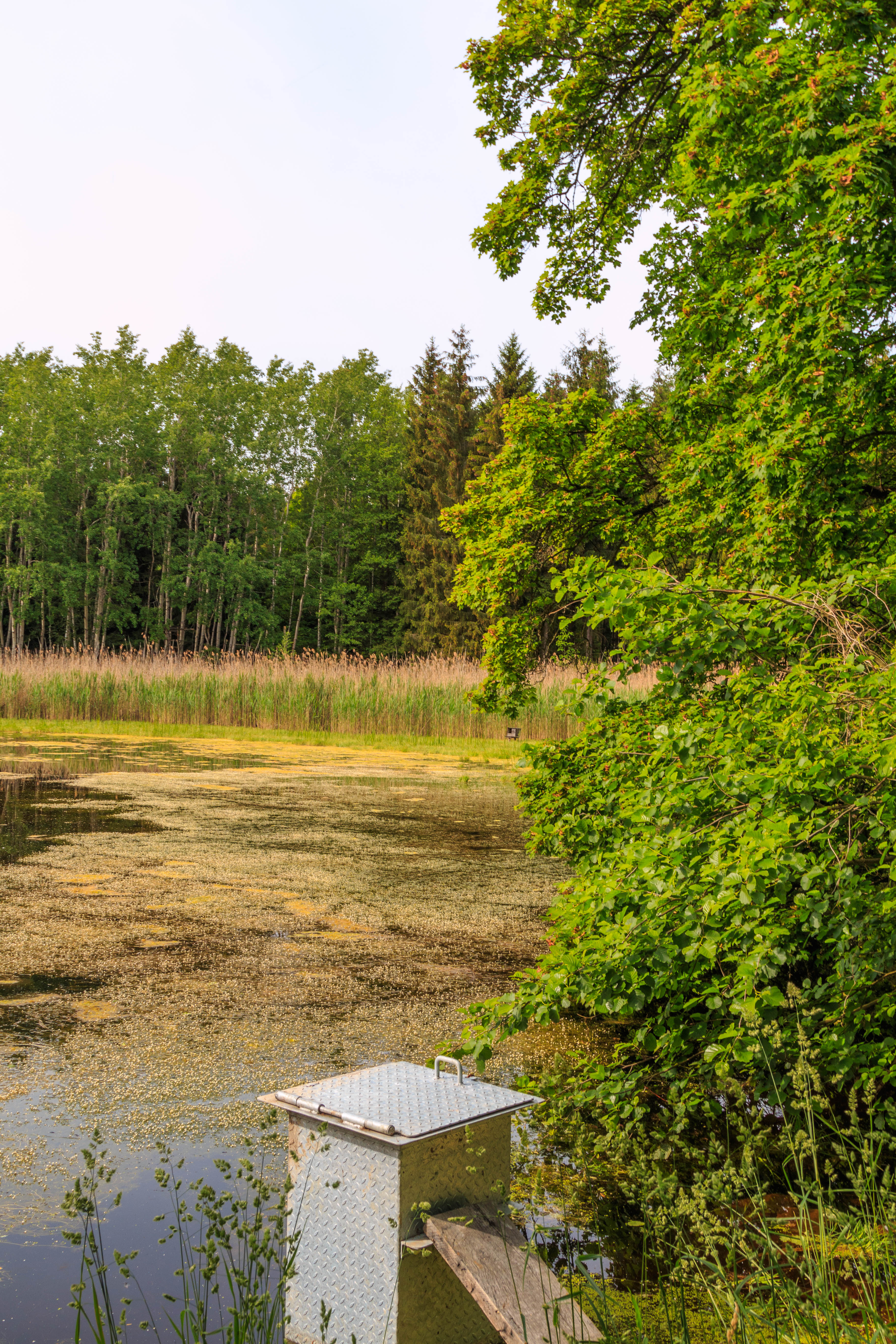 Přírodní památka rybník Strašidlo Project: Chráněná území.